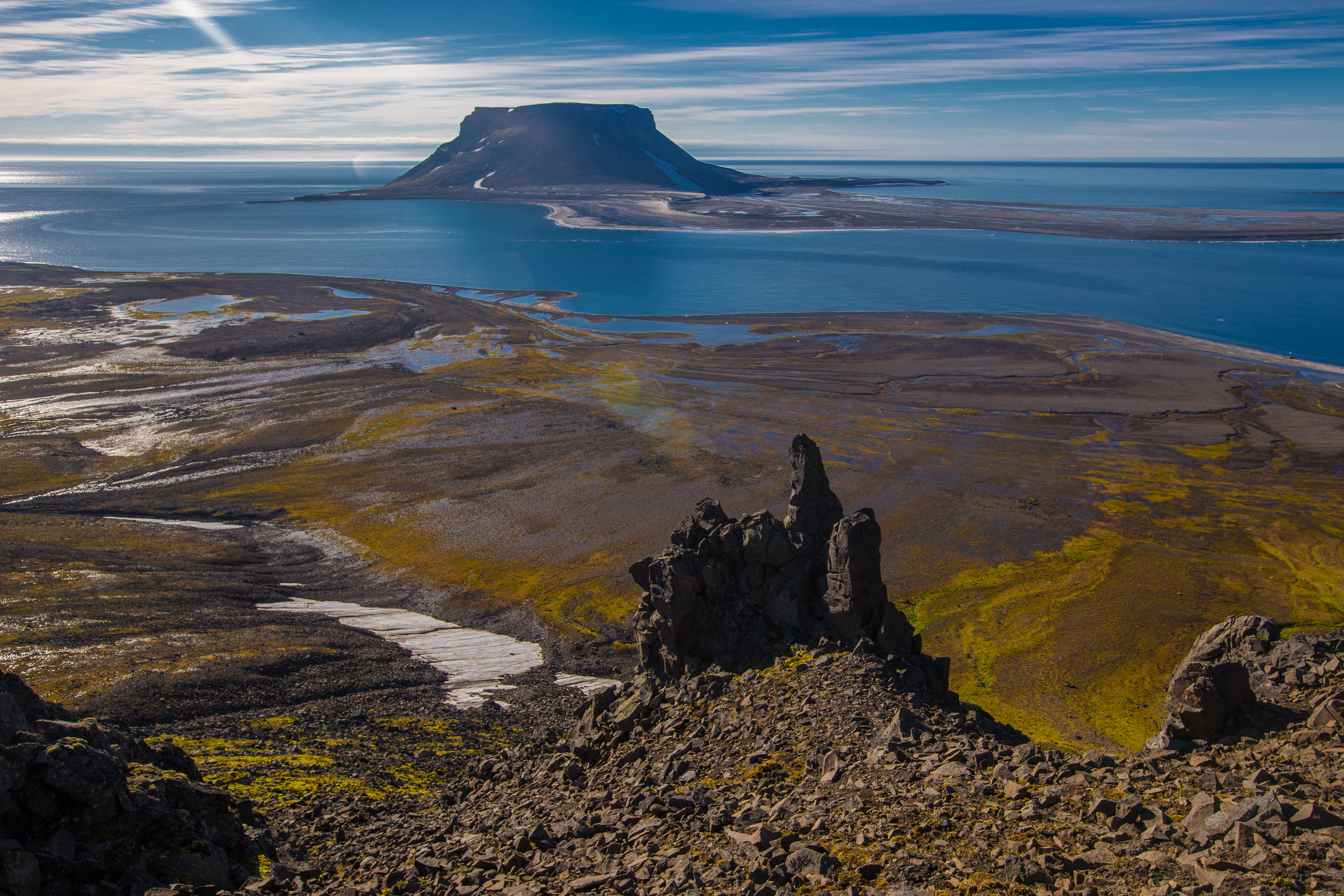 Остров Белл. Комплексный заказник Земля Франца-Иосифа, Приморский район This image is related to the protected area of Russia number 2930163